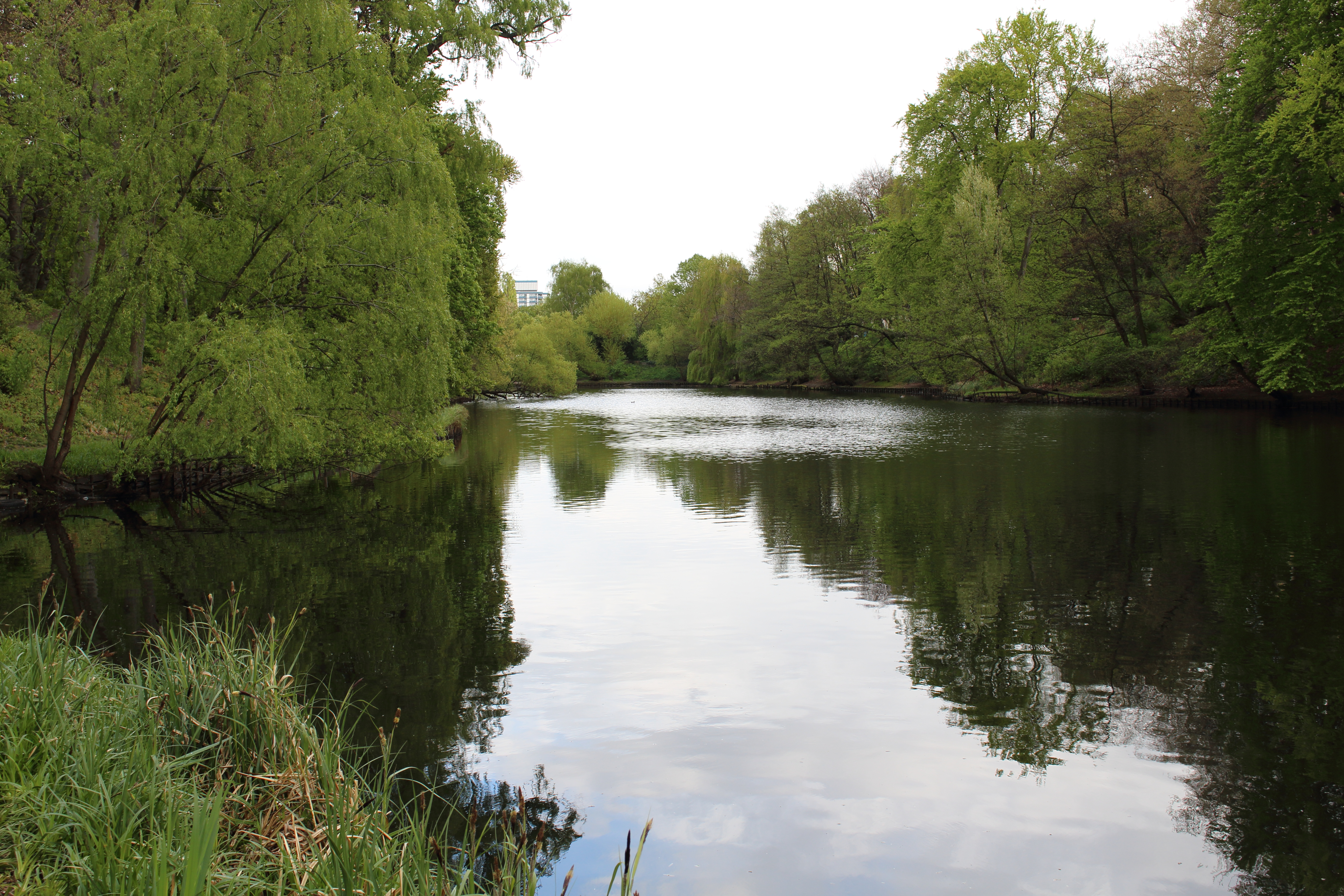 Östlicher Fennsee in Berlin-Wilmersdorf, vom nördlichen Ufer aus aufgenommen